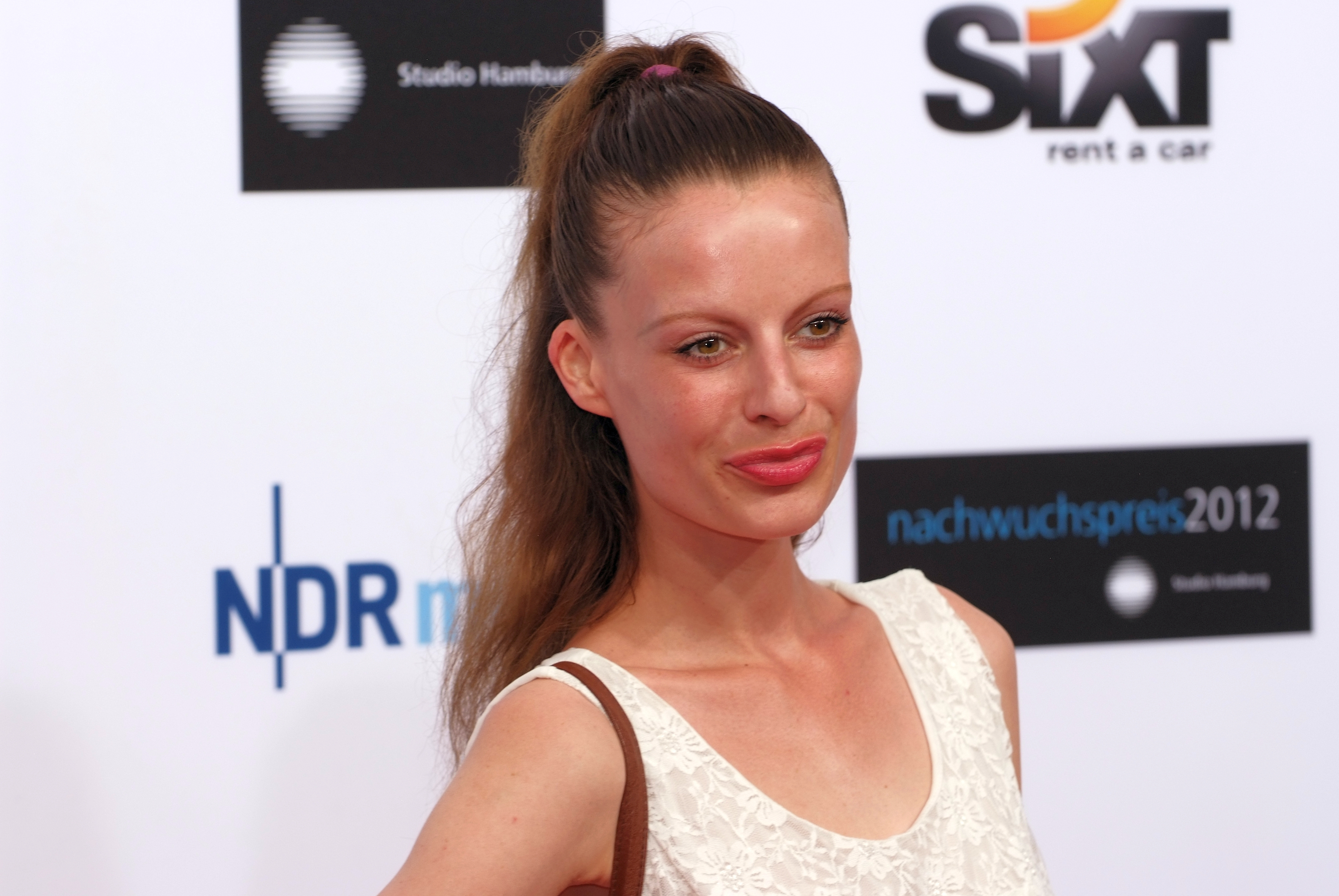 Studio Hamburg Nachwuchspreis 2012